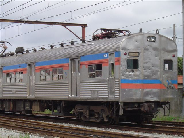 Trem 1600 Original - Linha A